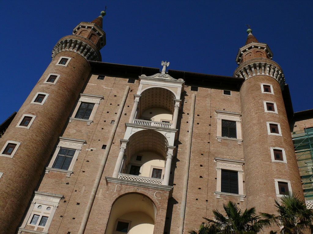 Urbino: Palazzo Ducale